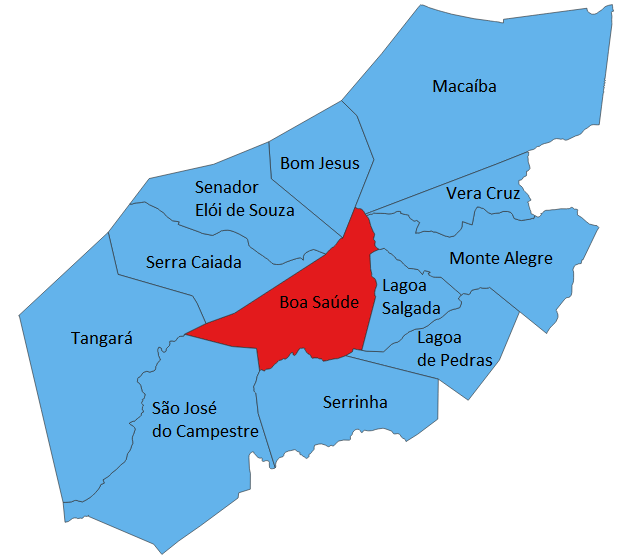 Boa Saúde e municipios limitrofes